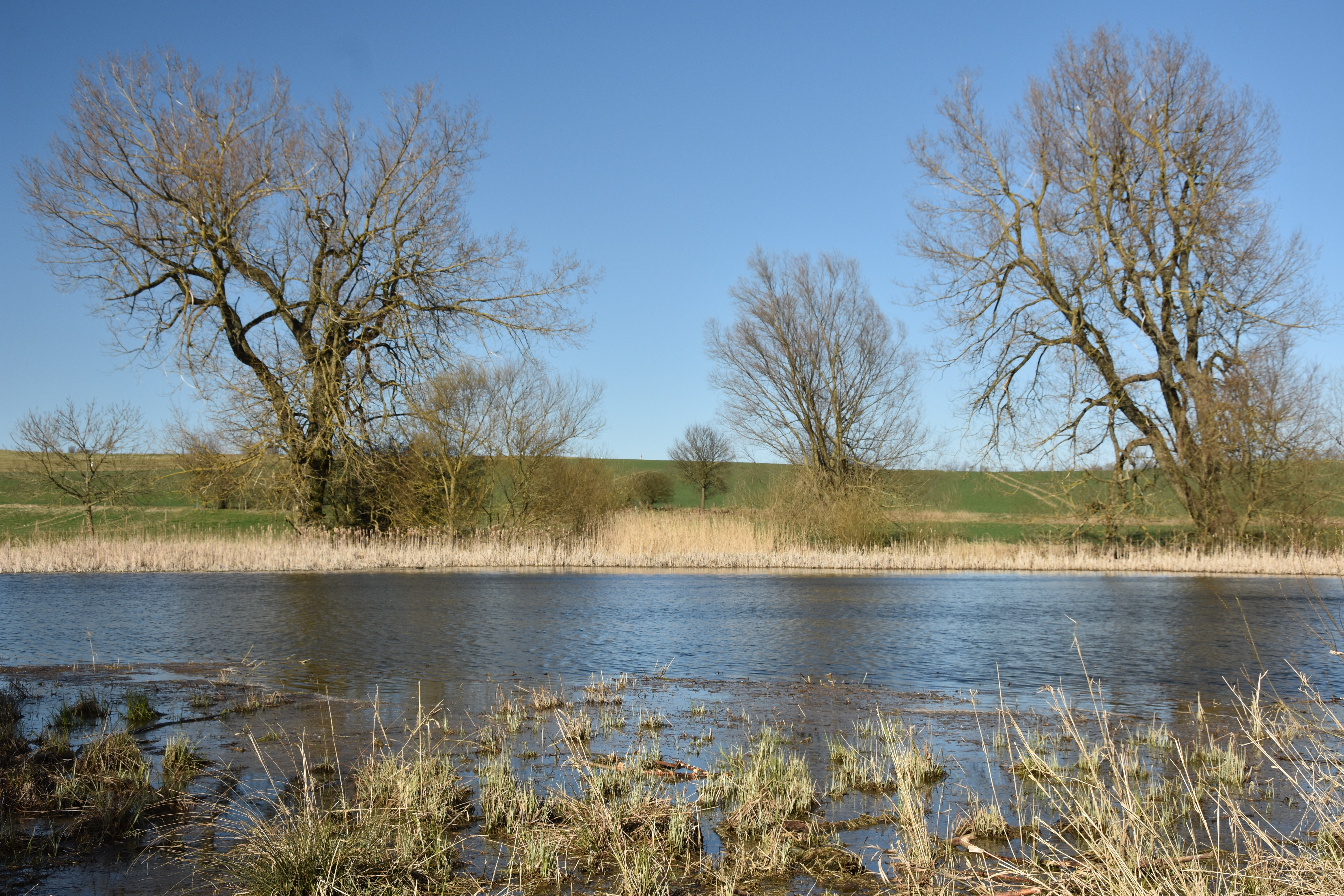 Zirka 500 Meter vom Ortseingang von Wachstedt liegt am Radweg in Richtung Küllstedt der Wachstedter See.